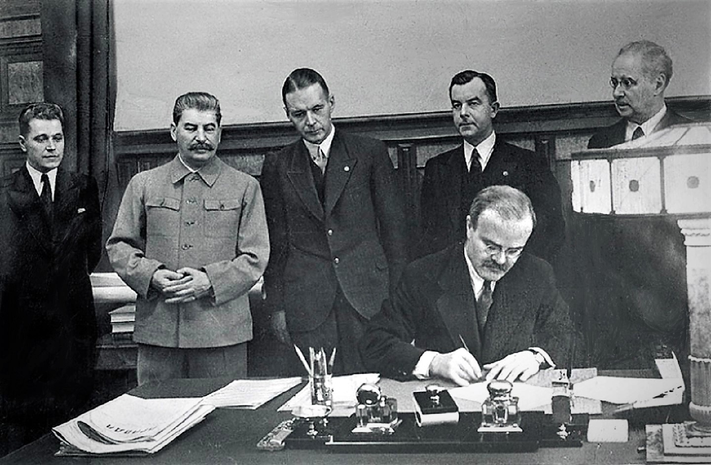 Подписание Договора о дружбе и взаимопомощи между СССР и Латвийской республикой. Договор подписывает Министр Иностранных дел СССР Вячеслав Молотов. За ним стоят слева направо: Полномочный представитель СССР в Латвии Иван Зотов, Секретарь ЦК ВКП(б) Иосиф Сталин, Министр иностранных дел Латвийской республики Вильгельм Мунтерс, посол Латвийской республики в СССР Фрицис Коциньш, первый заместитель иностранных дел СССР Владимир Потёмкин